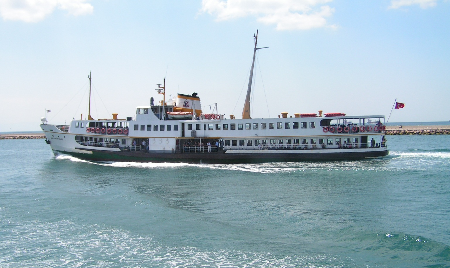 Un "vapeur": Bateau navette qui assure la liaison entre les deux rives du Bosphore Name: SEHIT METIN SULUS Turkish passenger ferry IMO Number: 8113229 MMSI Number: 271002523 Callsign: TC5417 Length: 58 m Beam: 11 m